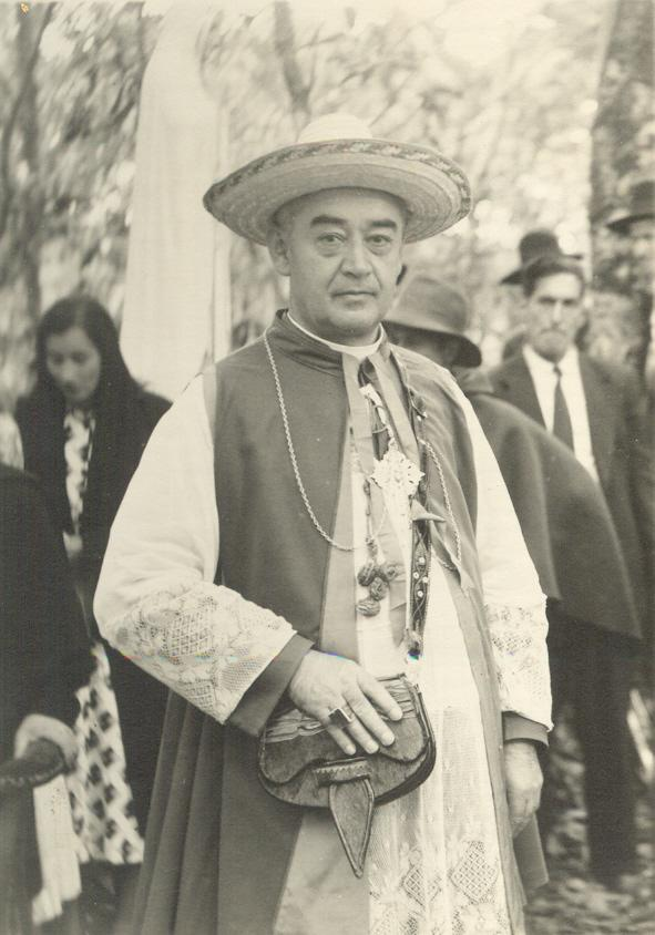 Monseñor Builes Misionero